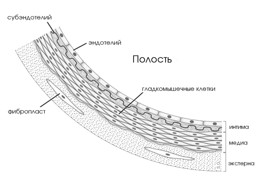 Строение стенки артерии.